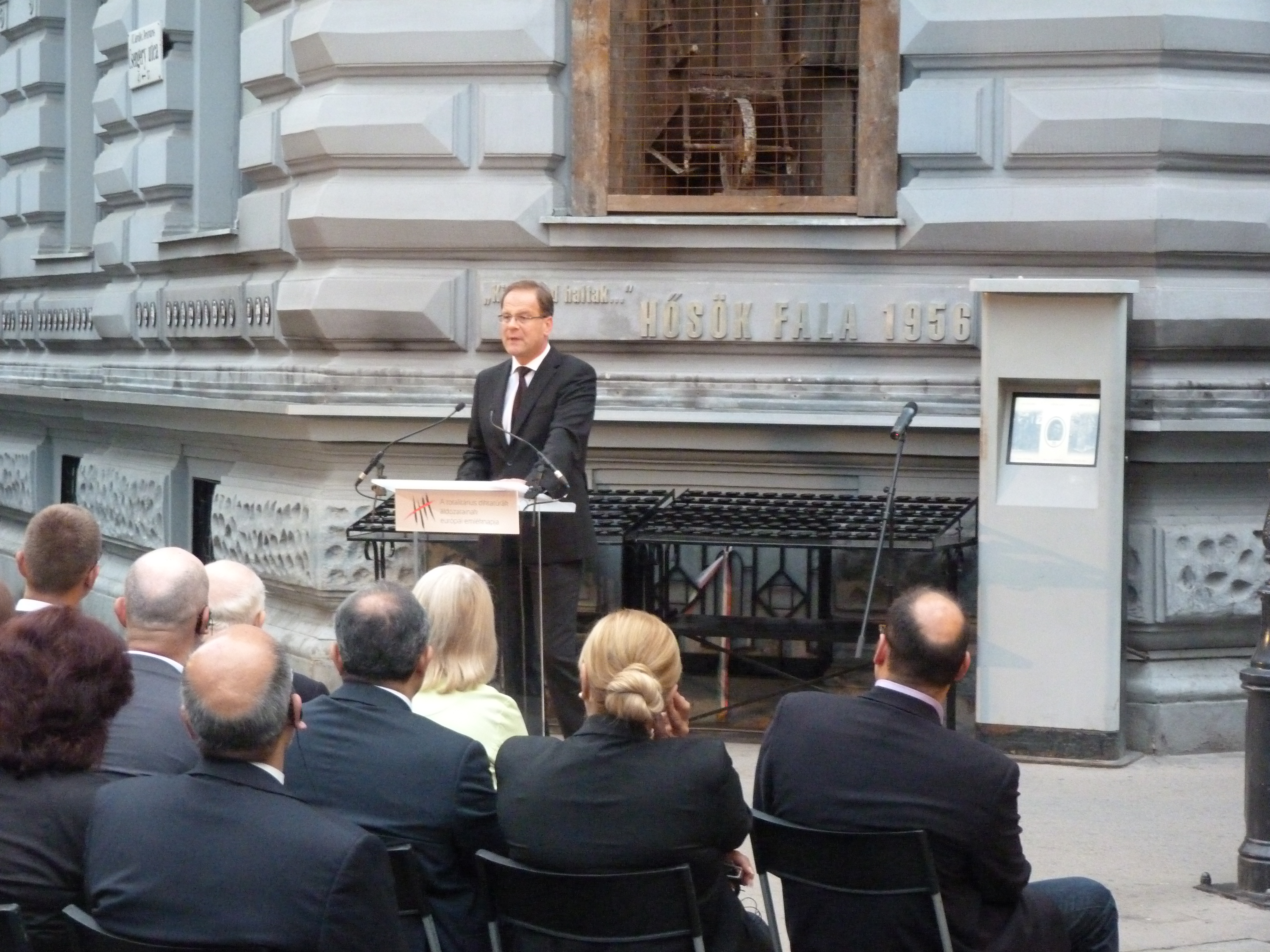 A felvétel 2014. augusztus 23-án készült Budapesten, a Terror Háza előtt. A Kommunizmus Áldozatainak Emléknapja.(angol: Memorial Day of the Victims of Communist Dictatorships) Navracsics Tibor. ©© Derzsi Elekes Andor, Budapest 2014, You are authorised to use this photo under Creative Commons – even for commercial, for profit purposes. Photos must be attributed to Derzsi Elekes Andor. All of the photos and vids in the Metapolisz DVD line are under Creative Commons and can be used even for commercial – for profit – purposes. Recommended Citation Derzsi Elekes Andor: Metapolisz DVD line Források: youtube: Memorial Day of the Victims of Communist Dictatorships - Budapest, 2014 08 23 (1) és Memorial Day of the Victims of Communist Dictatorships - Budapest, 2014 08 23 (2)